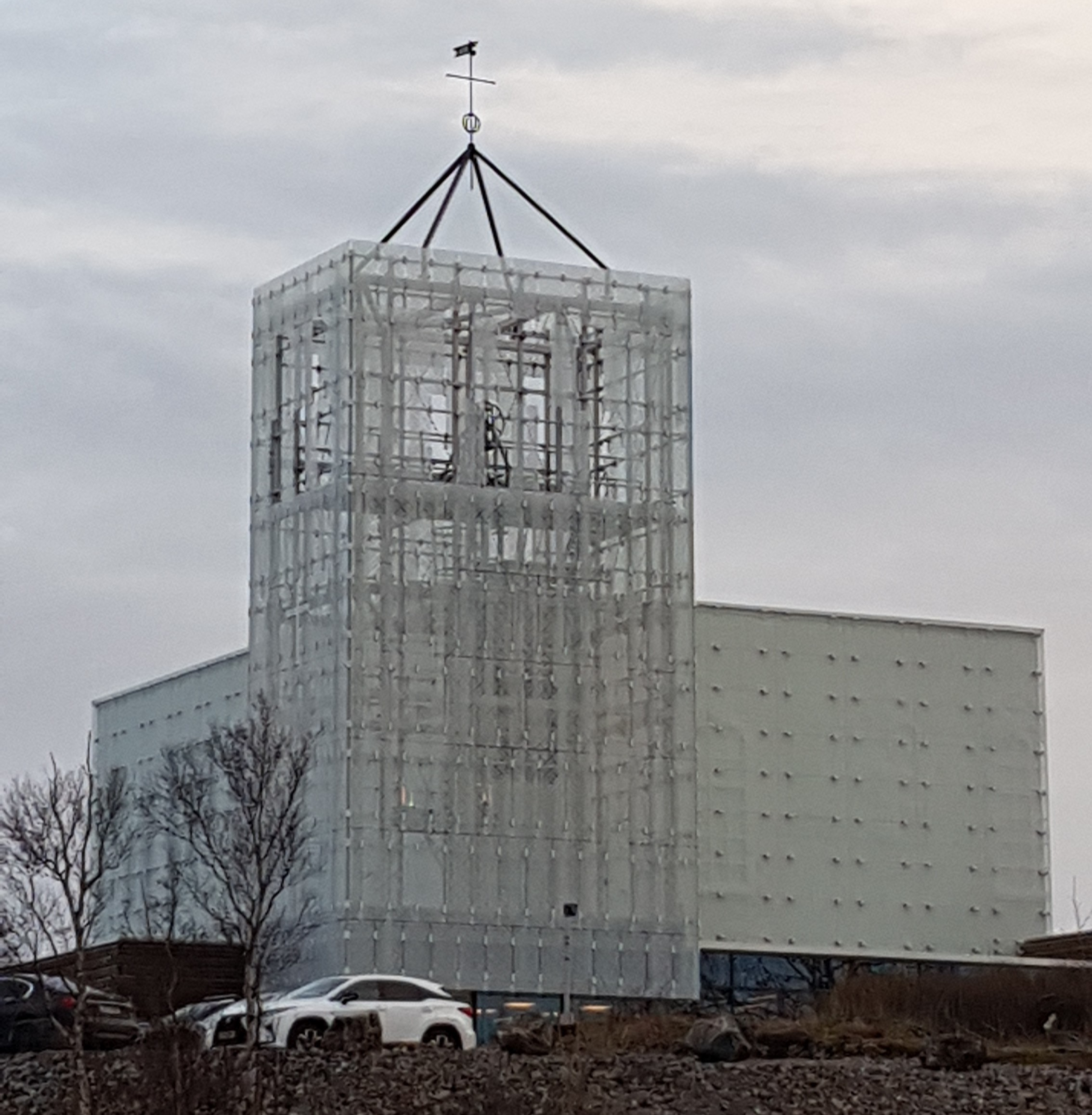 Ny kirke i Rørvik, etter at den gamle kirken brant. Den nye ble vigslet i 2019. Arkitekter: Pir II Arkitekter AS og Hartmann Prosjektrådgiving as